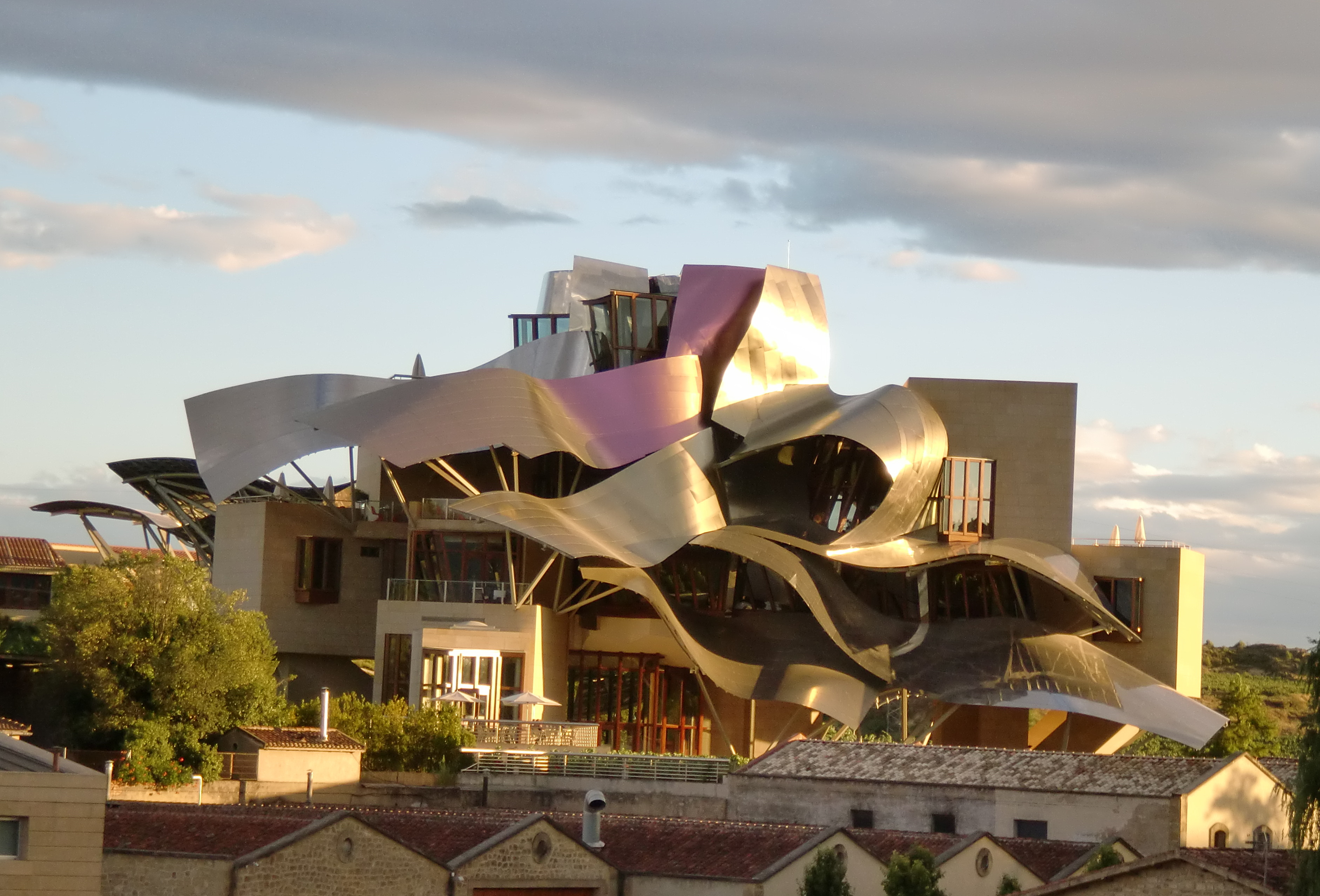 Bodega Marqués de Riscal en Elciego (Álava)